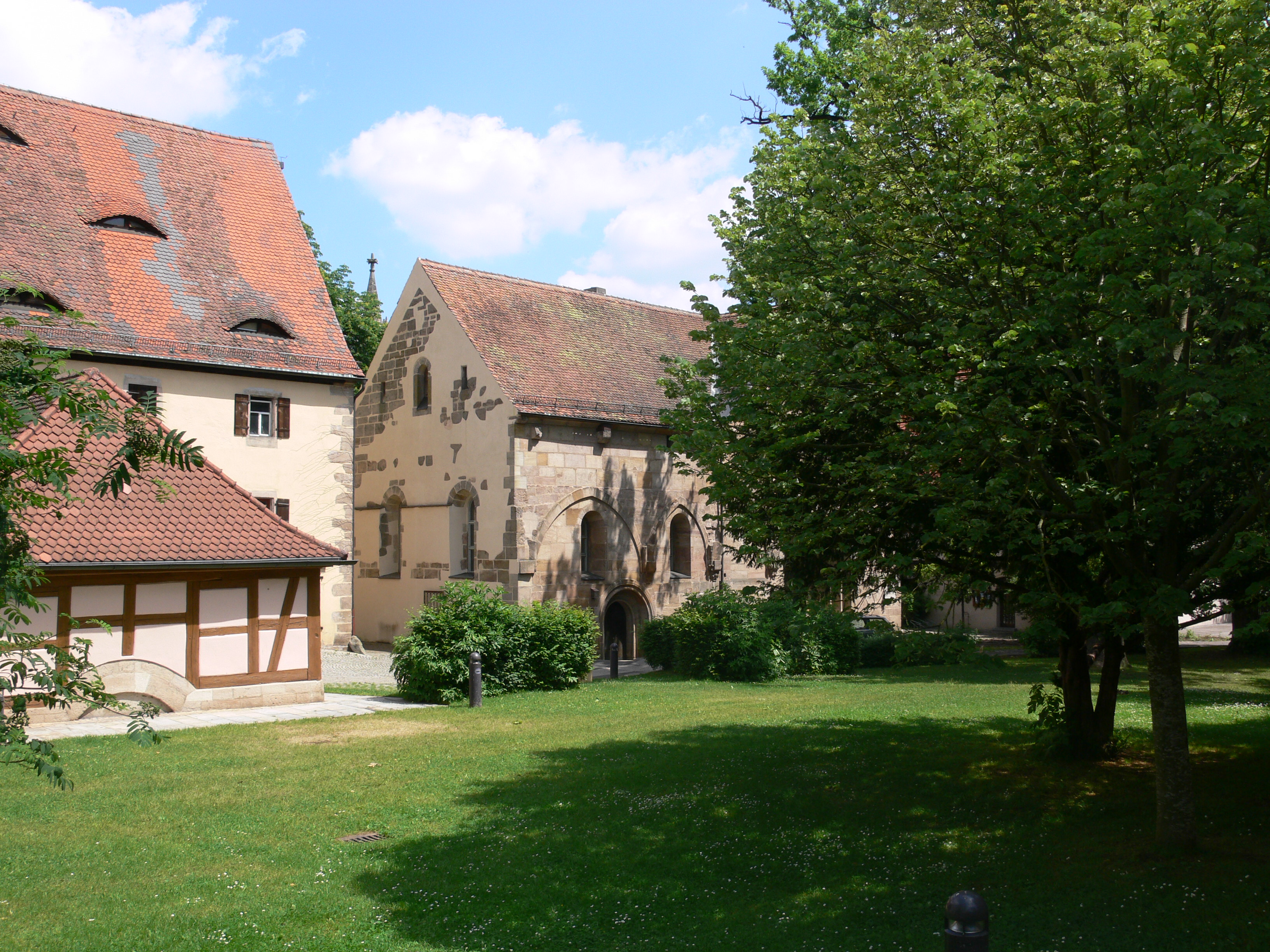 Heilsbronn, Landkreis Ansbach Heilbrunnen (links) und Refektorium (rechts)